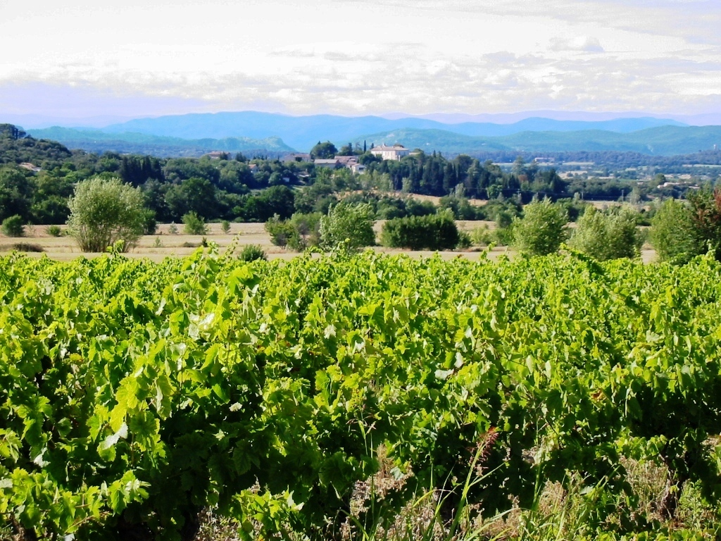 vue générale de Puechredon (Gard)